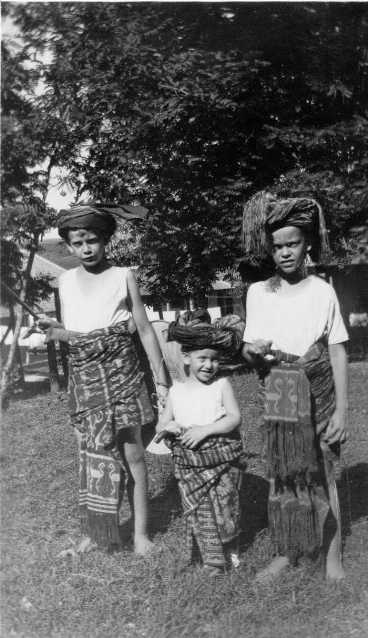 Foto uit eigen familiealbum. (rond 1930) vlnr: Jan, Kuno en Sweer van Dijk uitgedost in Soembanese kledij.